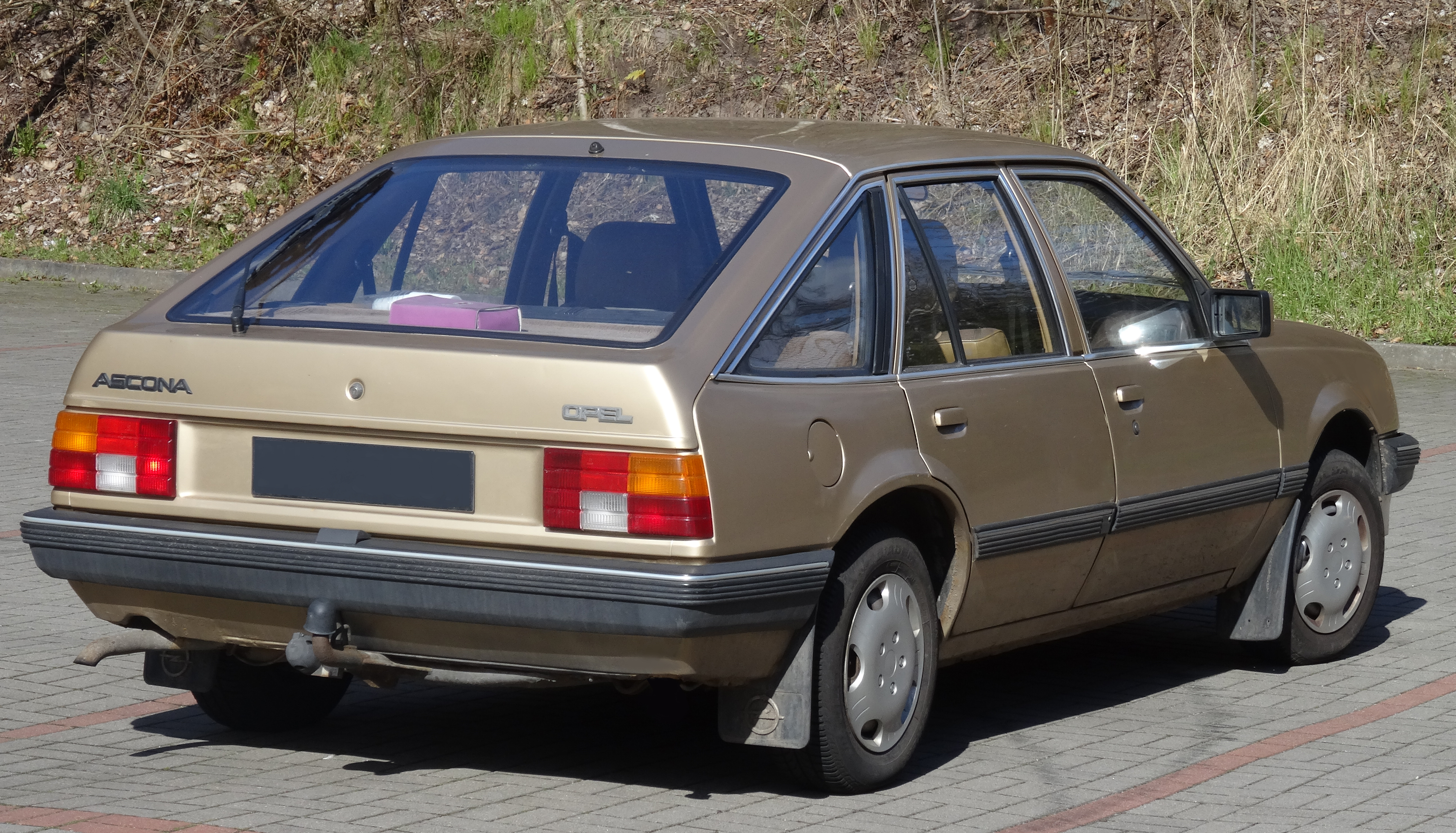 Opel Ascona C 5-drzwiowy liftback, 1981-88, tył